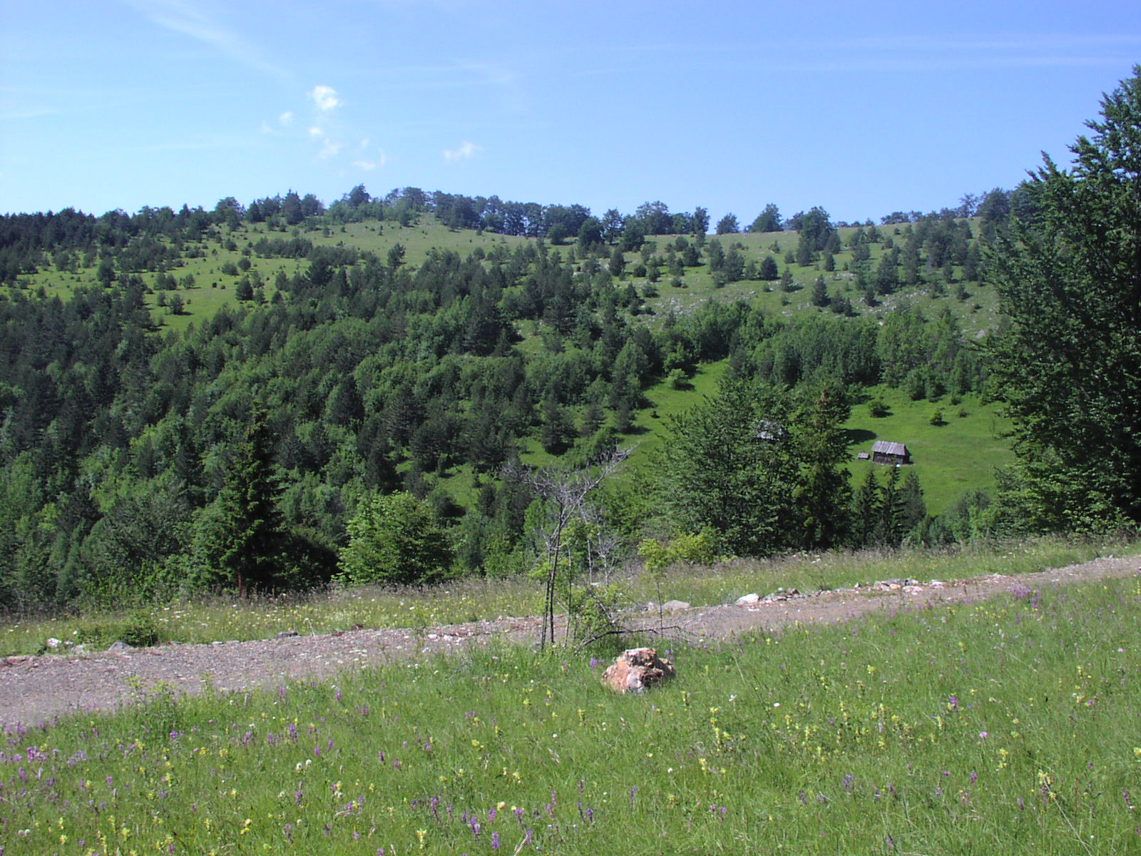 Nacionalni park Tara